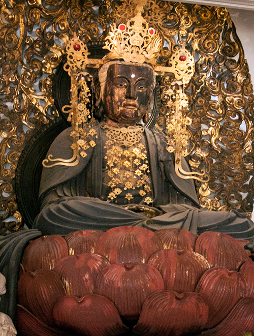 宝冠釈迦如来座像